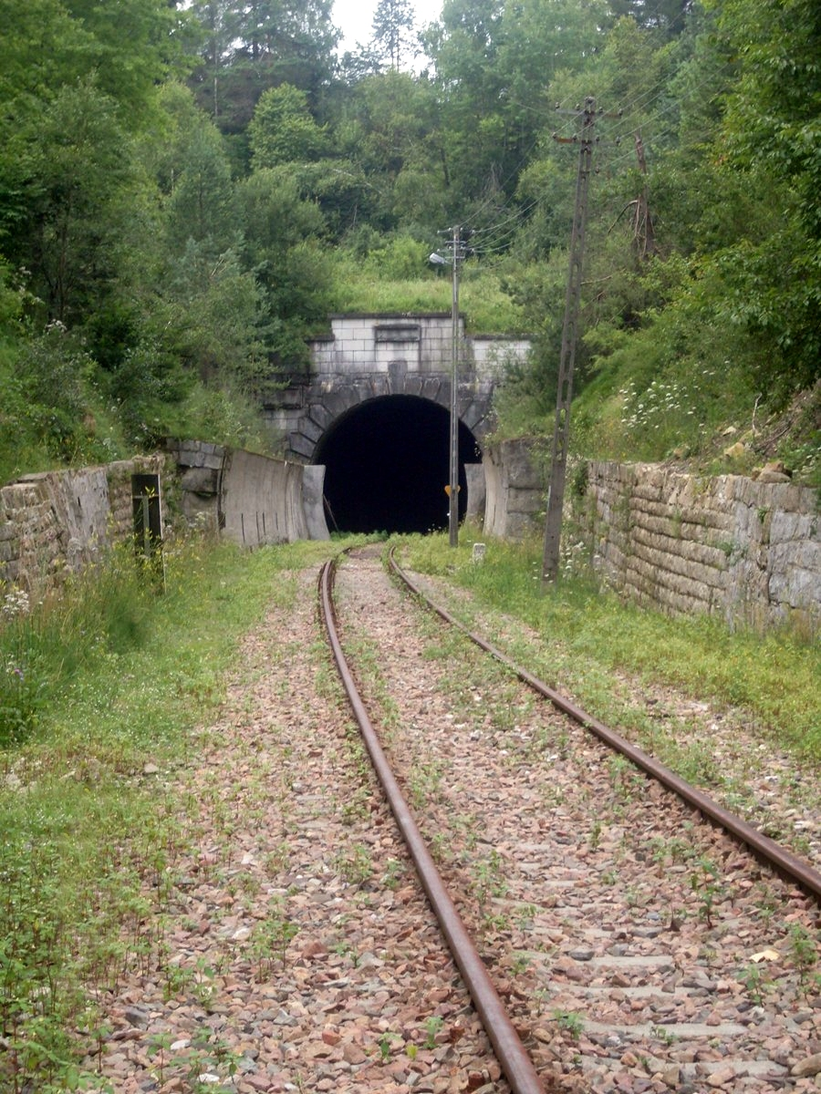 Wlot do tunelu kolejowego w Łupkowie od strony Polskiej